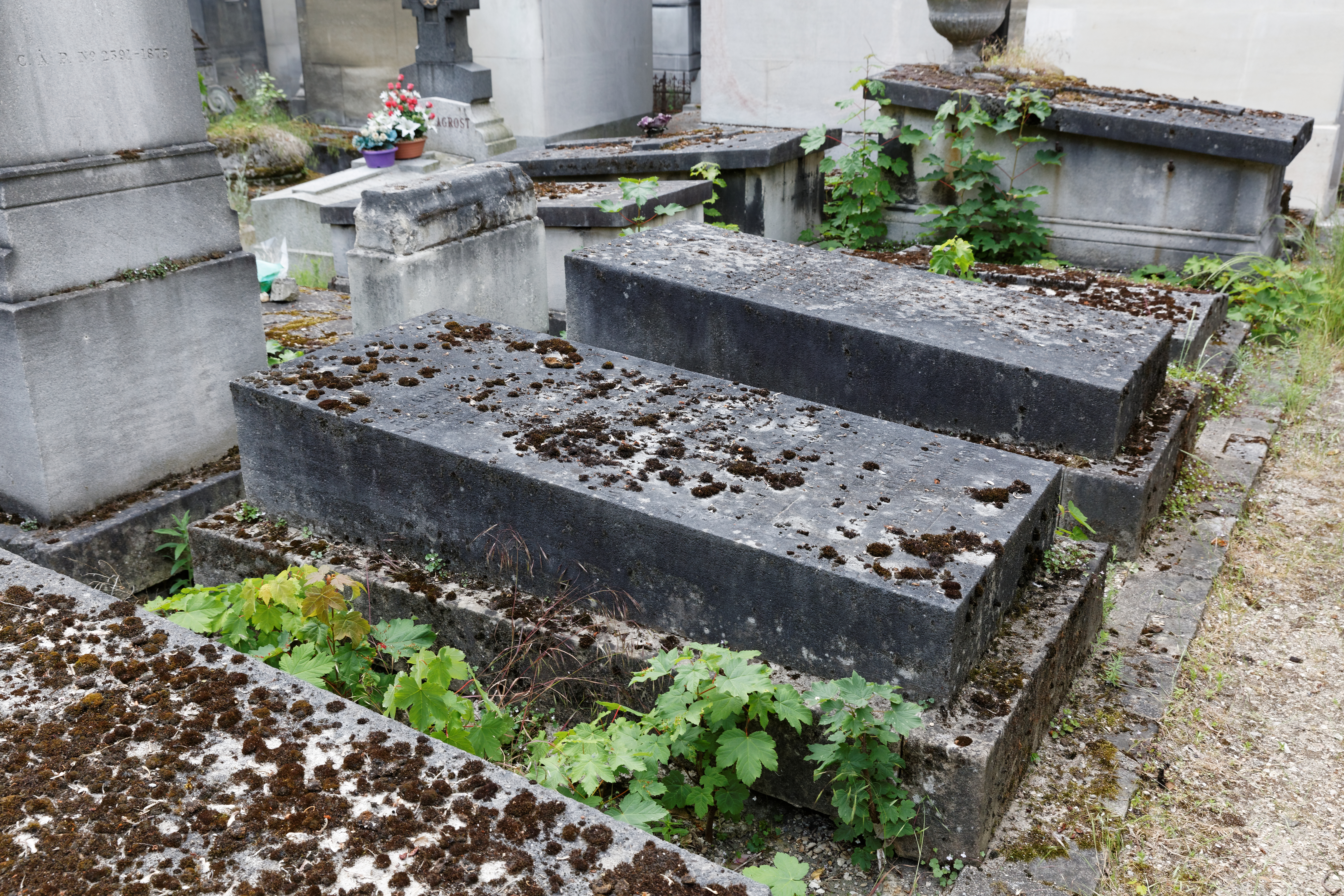 Sépulture d'Édouard Batiste (1820-1876), organiste, professeur et compositeur français.